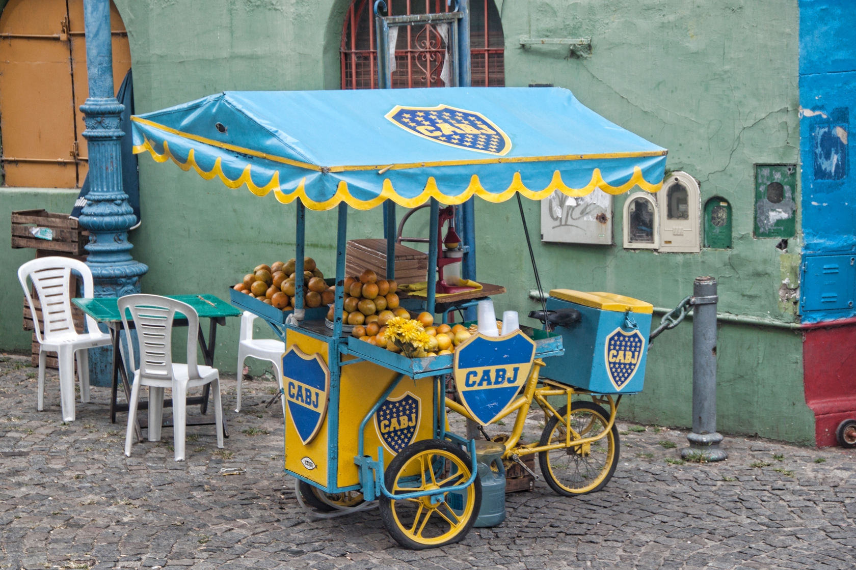 Buenos Aires, Aregentina S.A.